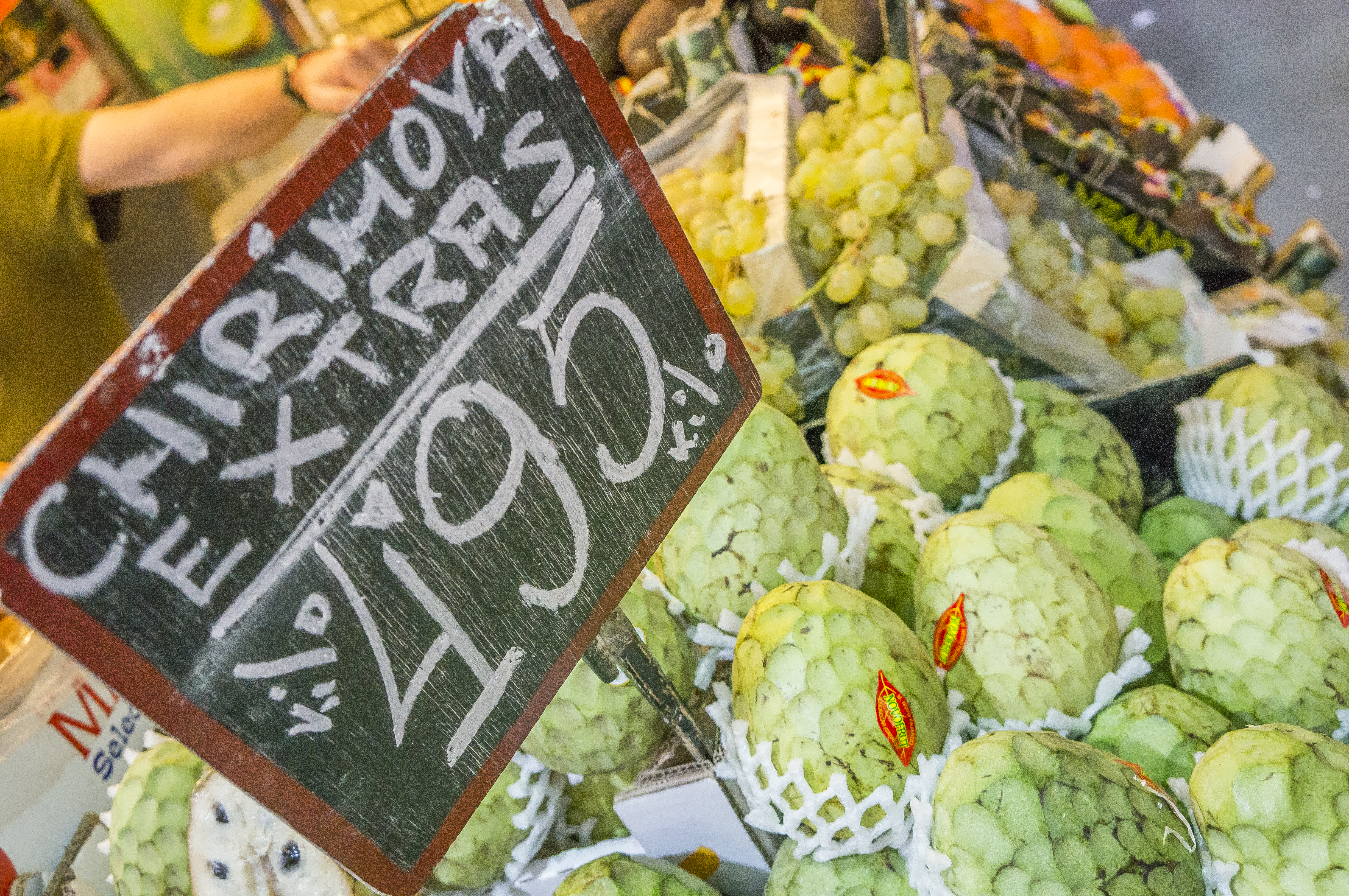 Chirimoyas a 4,95 €/kg (Málaga).